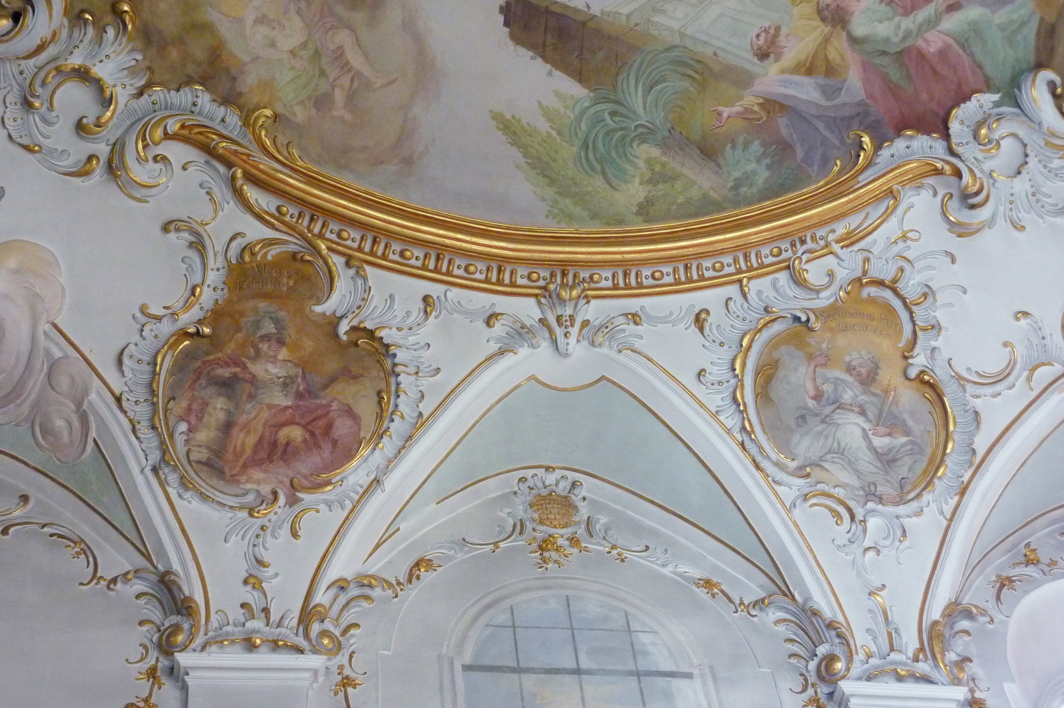 Katholische Wallfahrtskirche Mariä Himmelfahrt in Buggenhofen, einem Ortsteil von Bissingen im Landkreis Dillingen an der Donau (Bayern), Chorfresko von Johann Baptist Enderle, von 1769, Stuck von Laurentin Hieber von 1768/69, Stuckkartuschen mit Darstellung von Tugenden Marias, links: Maria mit Helm, Rüstung und Säule; Inschrift: Mea est Fortitudo, Prov. Himmelfahrt; rechts: Maria mit Taube, Zepter, brennender Kerze, Fuß auf Schlange; Inschrift: Secundum Puritatem, Ps. 17